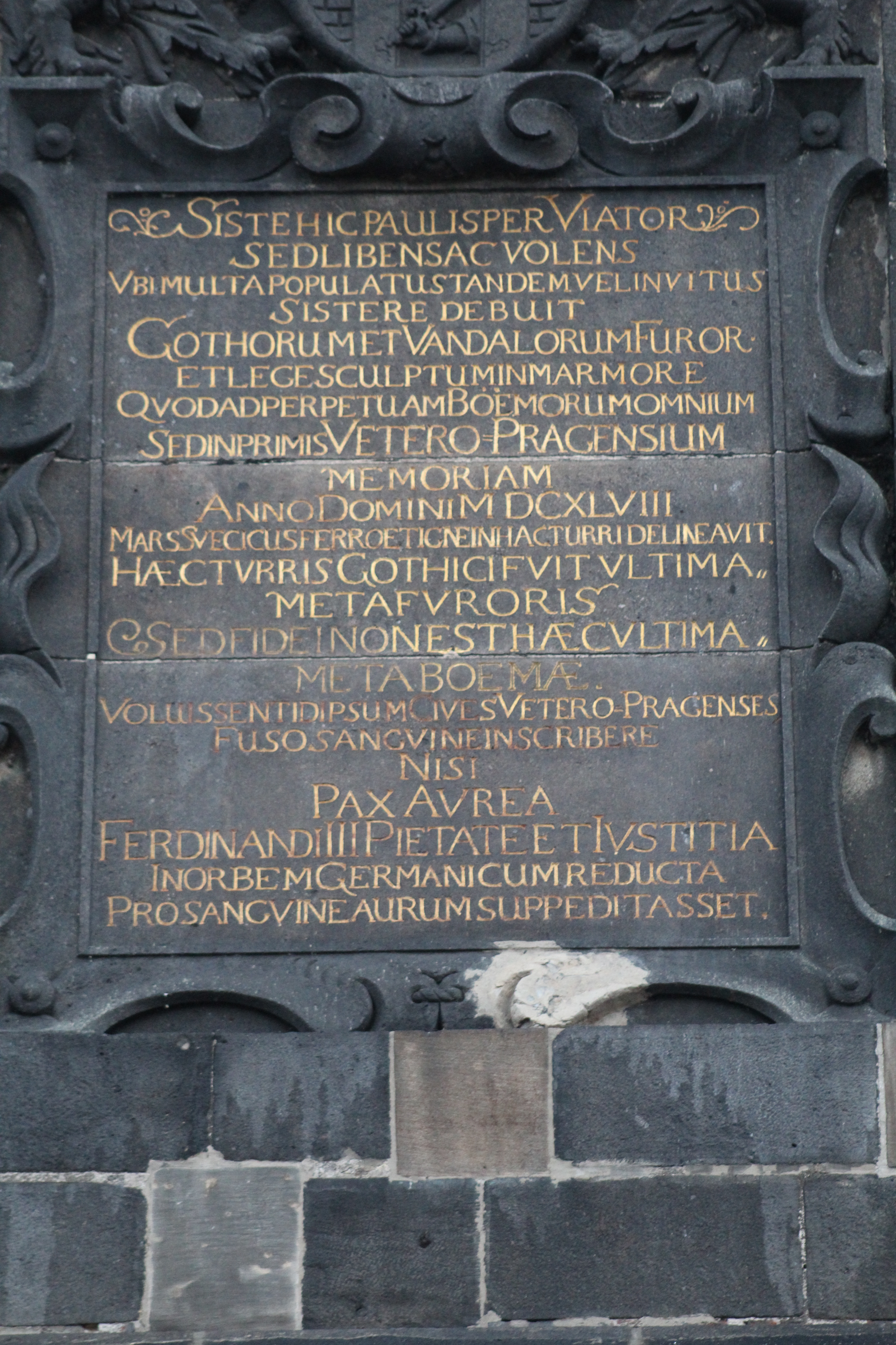 Inscription sur la tour gothique du pont Charles de Prague.